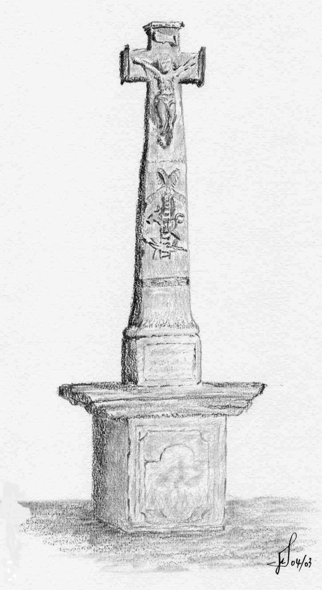 croix commémorative restaurée en grés rose - carrefour rue Aristide Briand, route de Chavré - Raon-L'Étape 88372